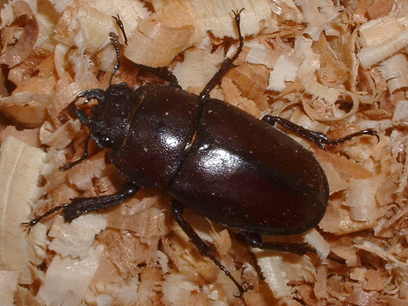 ノコギリクワガタの成虫（♀）